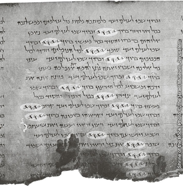 El nombre divino en los rollos del mar Muerto. Muestran que el Tetragrámaton aparece varias veces en los Rollos del Mar Muerto (extracto de los salmos que datan de la primera mitad del siglo I d.C.). Que el texto está en el estilo de las letras hebreas de uso común después del exilio babilónico, pero el Tetragrámaton aparece repetidamente en alfabeto de hebreo arcaico